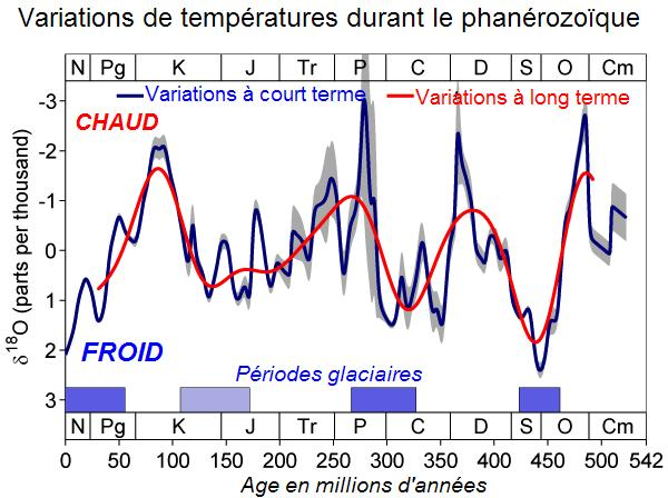 Variations_de_températures_globales